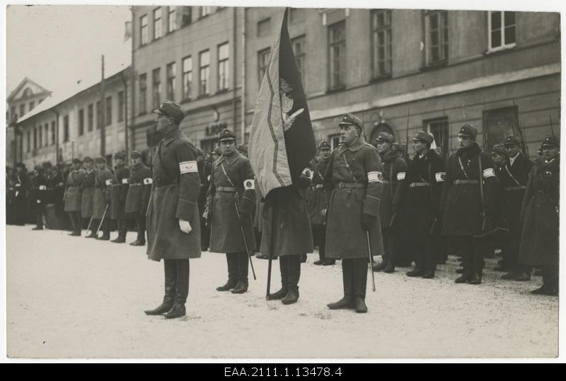 Kaitseliidu Tartu maleva 1. aastapäeva tähistamine, paraad Tartu Raekoja platsil 06.12.1925. Esiplaanil maleva pealik Villem Saarsen.